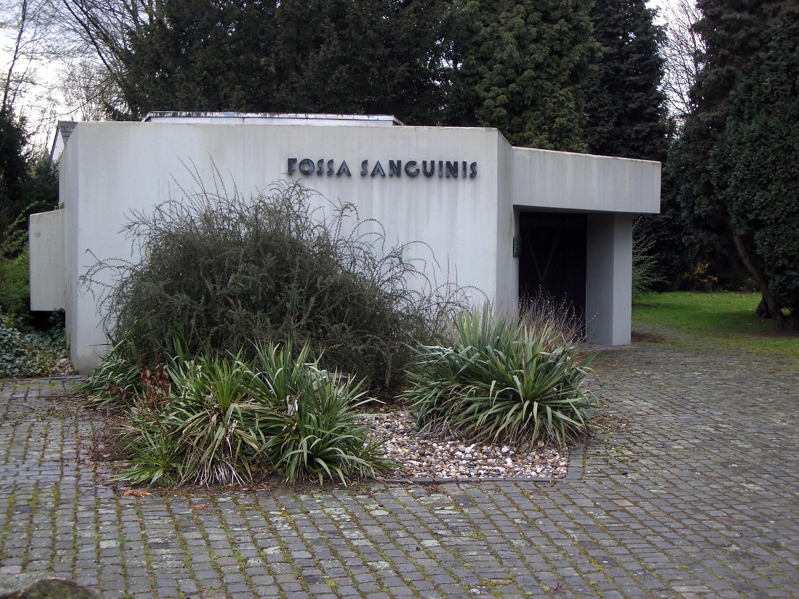 Schutzbau der 1956 ausgegrabenen Römischen Kultanlage der großen Göttermutter vom Ida-Gebirge (Kybele/Magna Mater): Fossa Sanguinis. Der Bau wurde 1963 in Neuss/Gnadental errichtet.